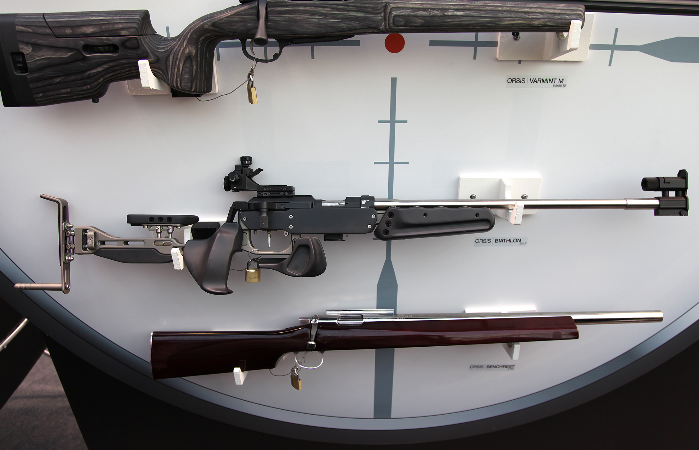 .22 LR спортивная винтовка ORSIS BIATHLON (.22 LR ORSIS BIATHLON sport rifle)